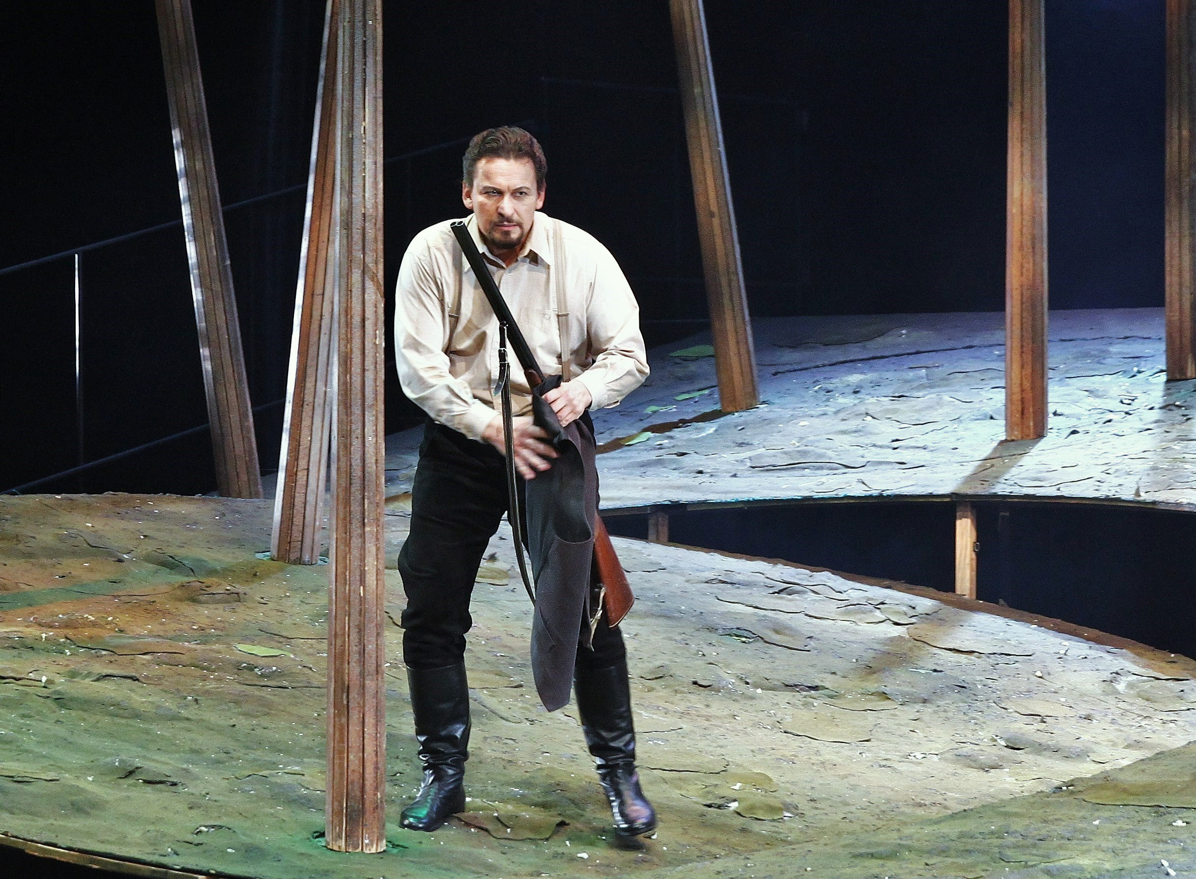 Martin Bárta, český operní zpěvák-barytonista (v roli Revírníka v Janáčkově opeře "Příhody lišky Bystroušky", Národní divadlo)